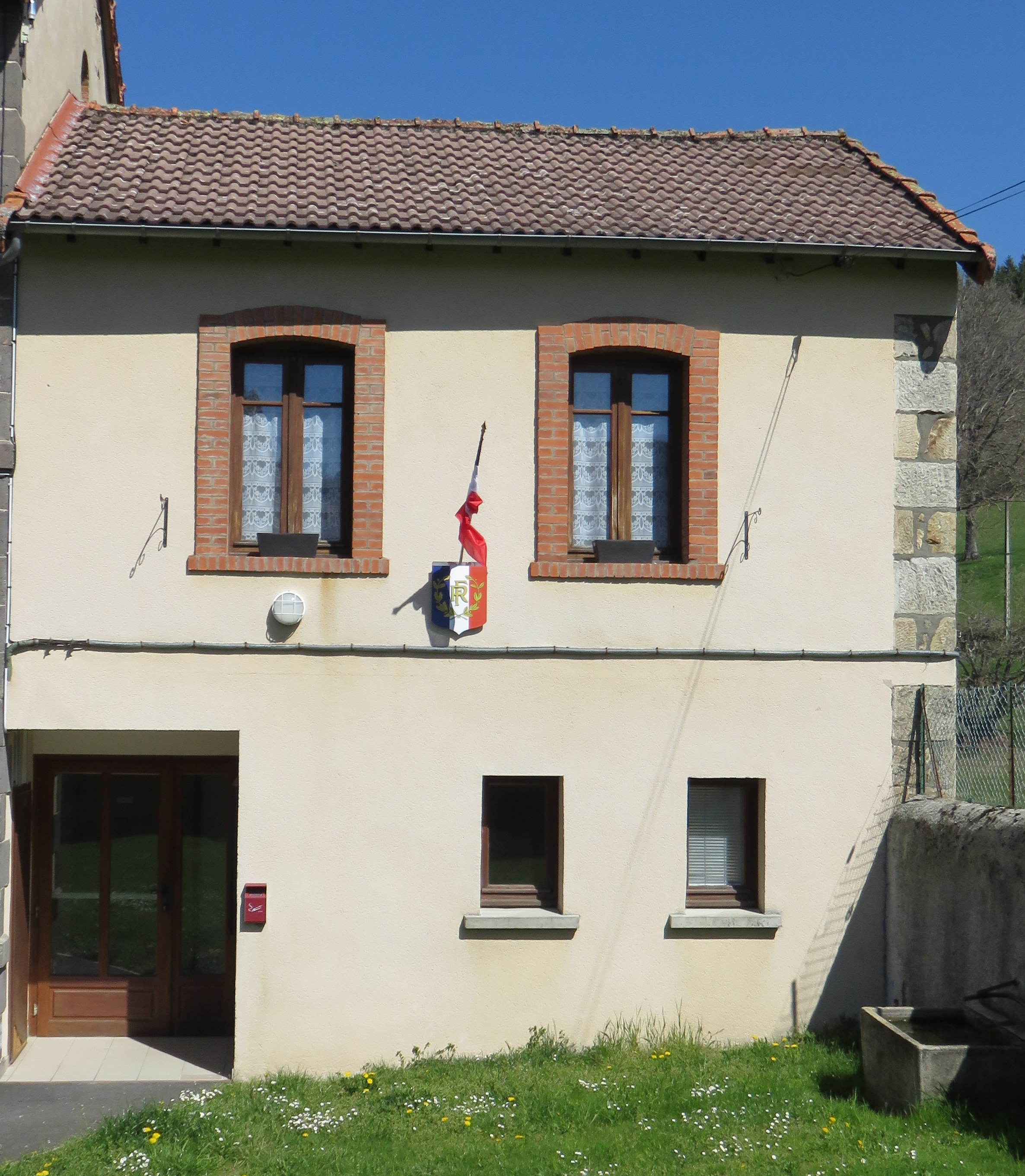 Mairie de Baffie, dans le Puy-de-Dôme.